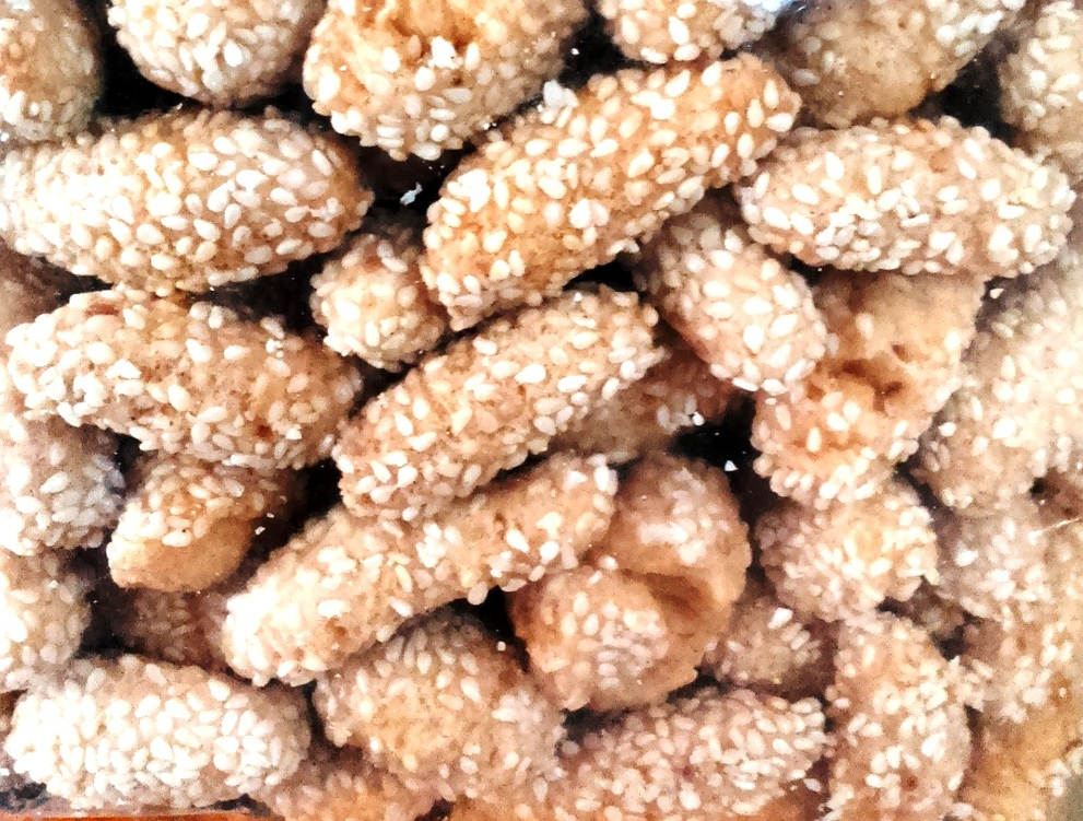 Keciput, sejenis onde2 dari kota Kudus, Jawa Tengah